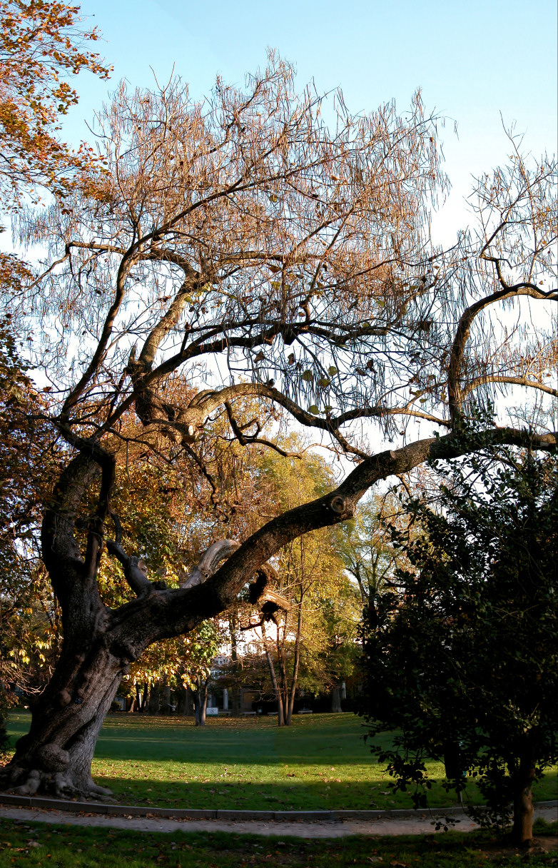 Uno degli alberi secolari dei Giardini della Guastalla (Milano). Foto scattata da Stefano Trezzi (Utente:Yoruno) e da me licenziata secondo la licenza sotto indicata.